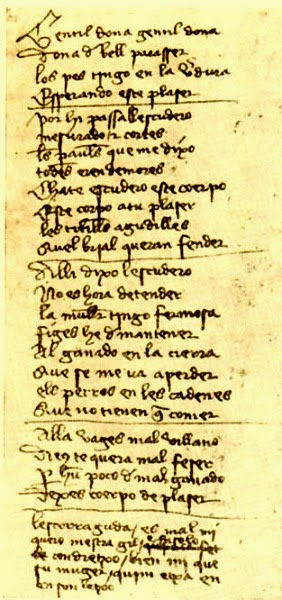 Fragmento de un romance encontrado en el cartapacio del estudiante de leyes Jaume de Olesa. Se considera el primer testimonio escrito hasta ahora encontrado.